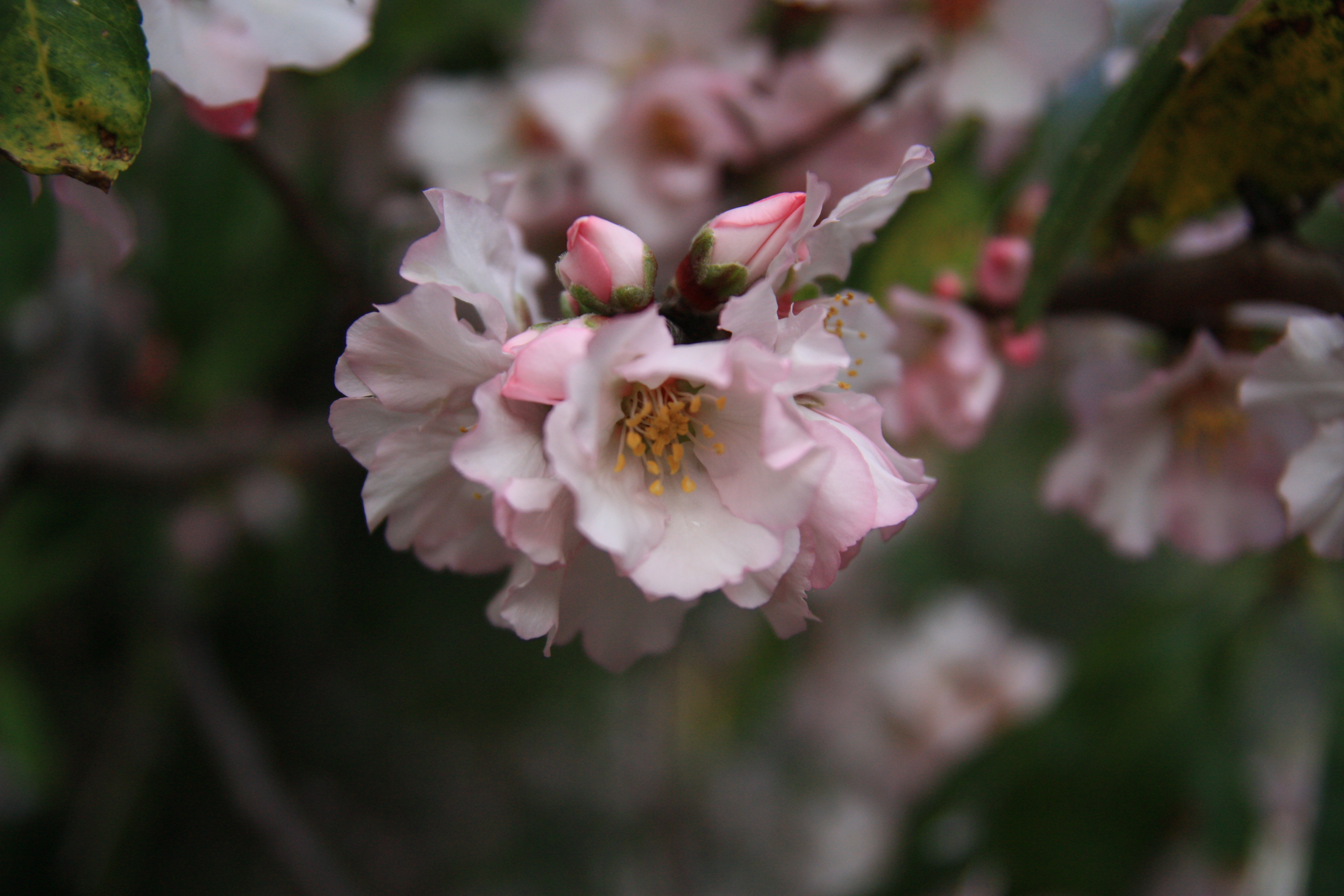 חורשת המייסדים - גבעת השבשבת, נוה שאנן חיפה enI Founders Grove - Pinwheel Hill Haifa